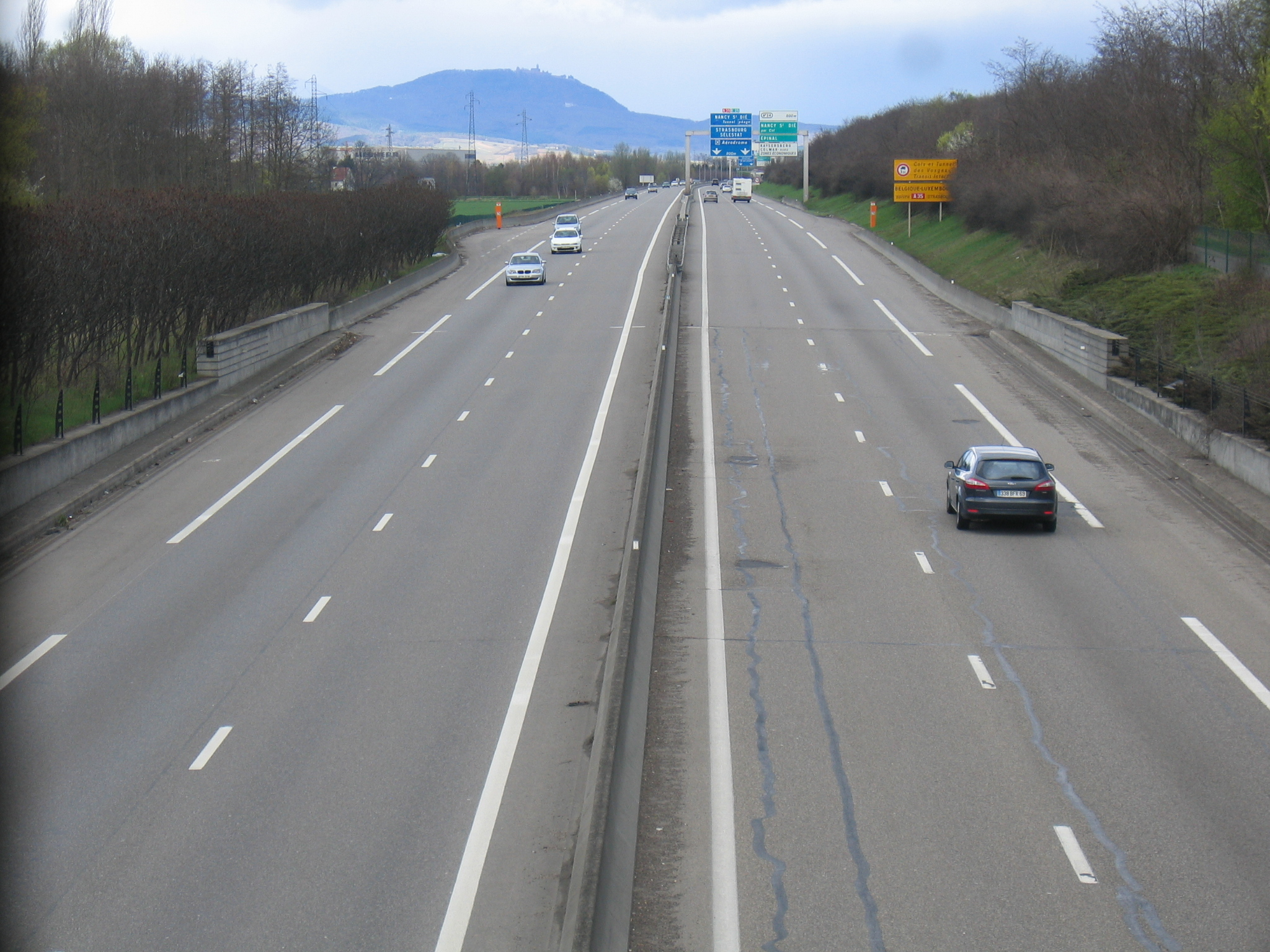 L'autoroute A35 à l'est de Colmar